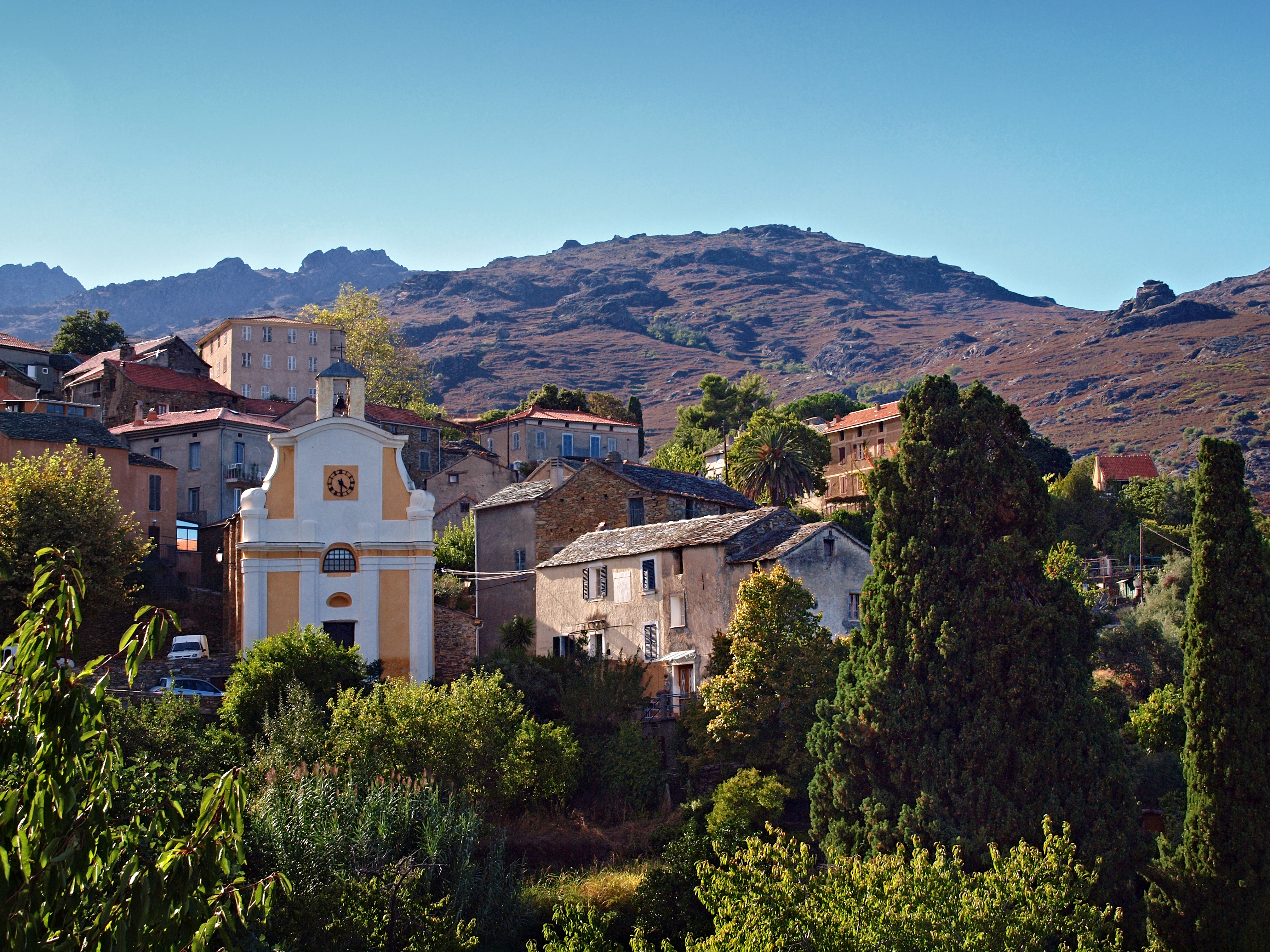 Sorio (Corsica) - Vue du village